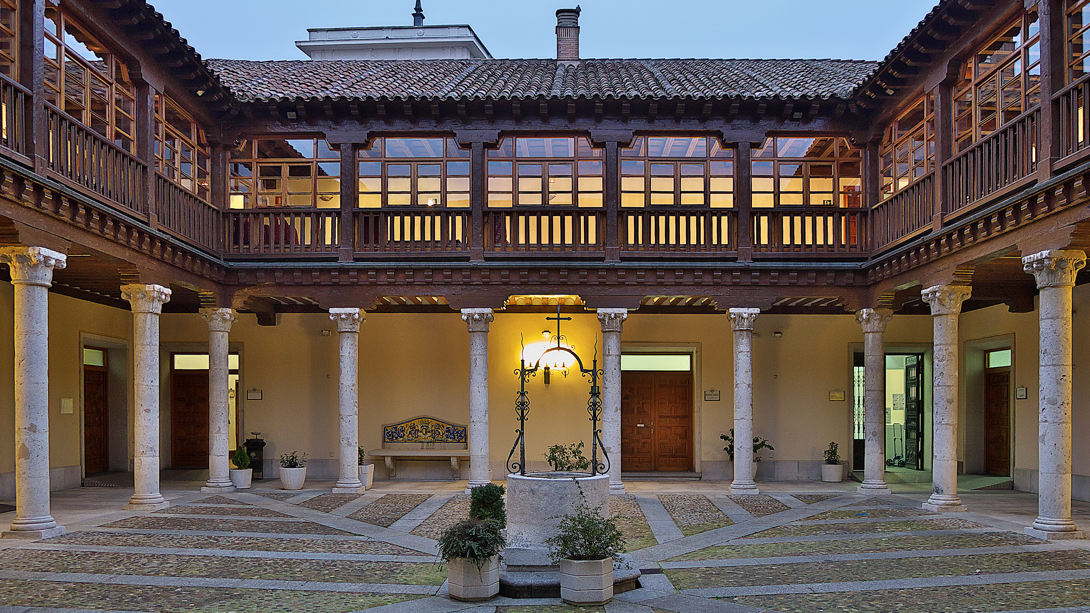 El Palacio de Pimentel perteneció al Marquesado de Távara (1541).